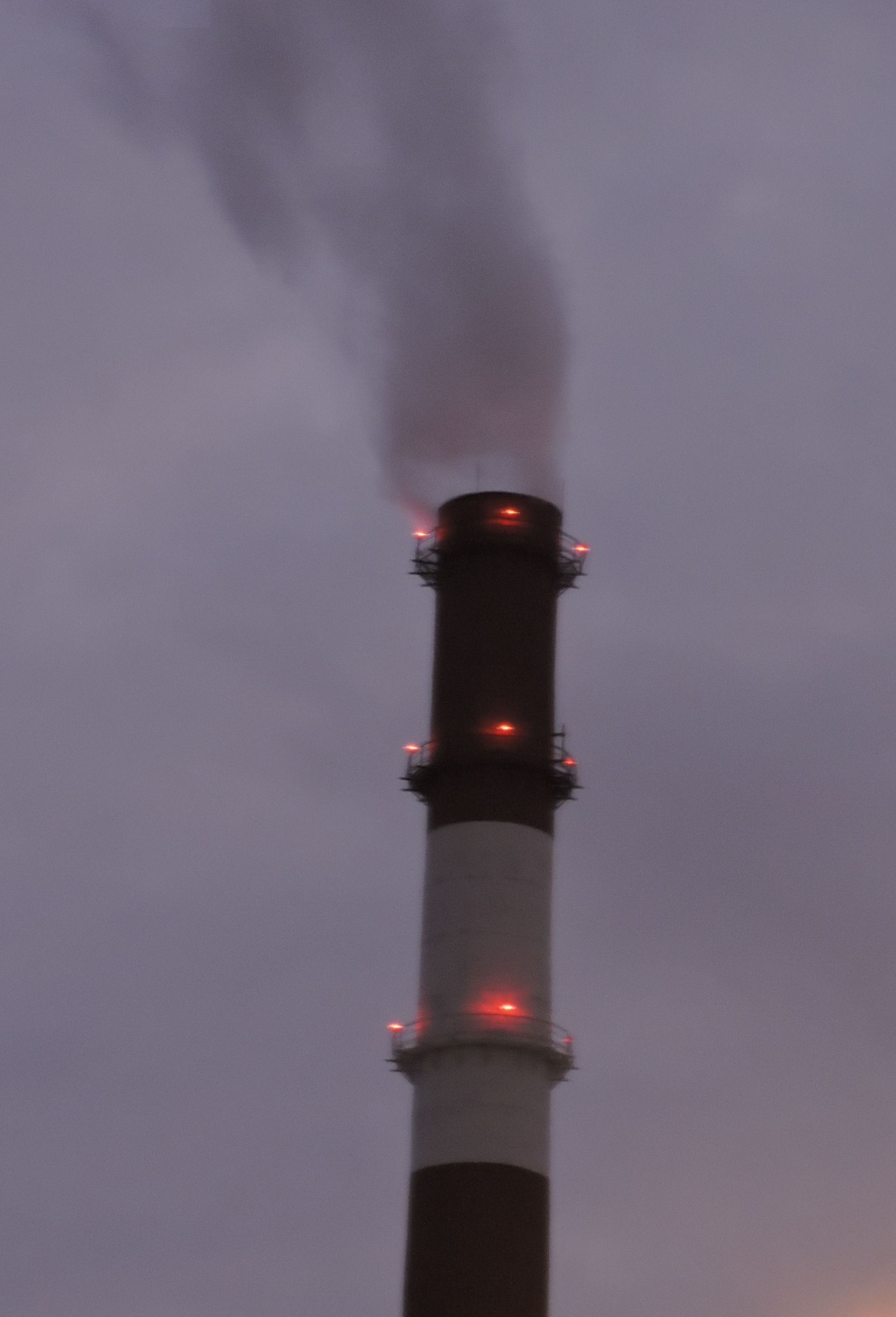 Дневная маркировочная окраска и сигнальные огни на дымовой трубе